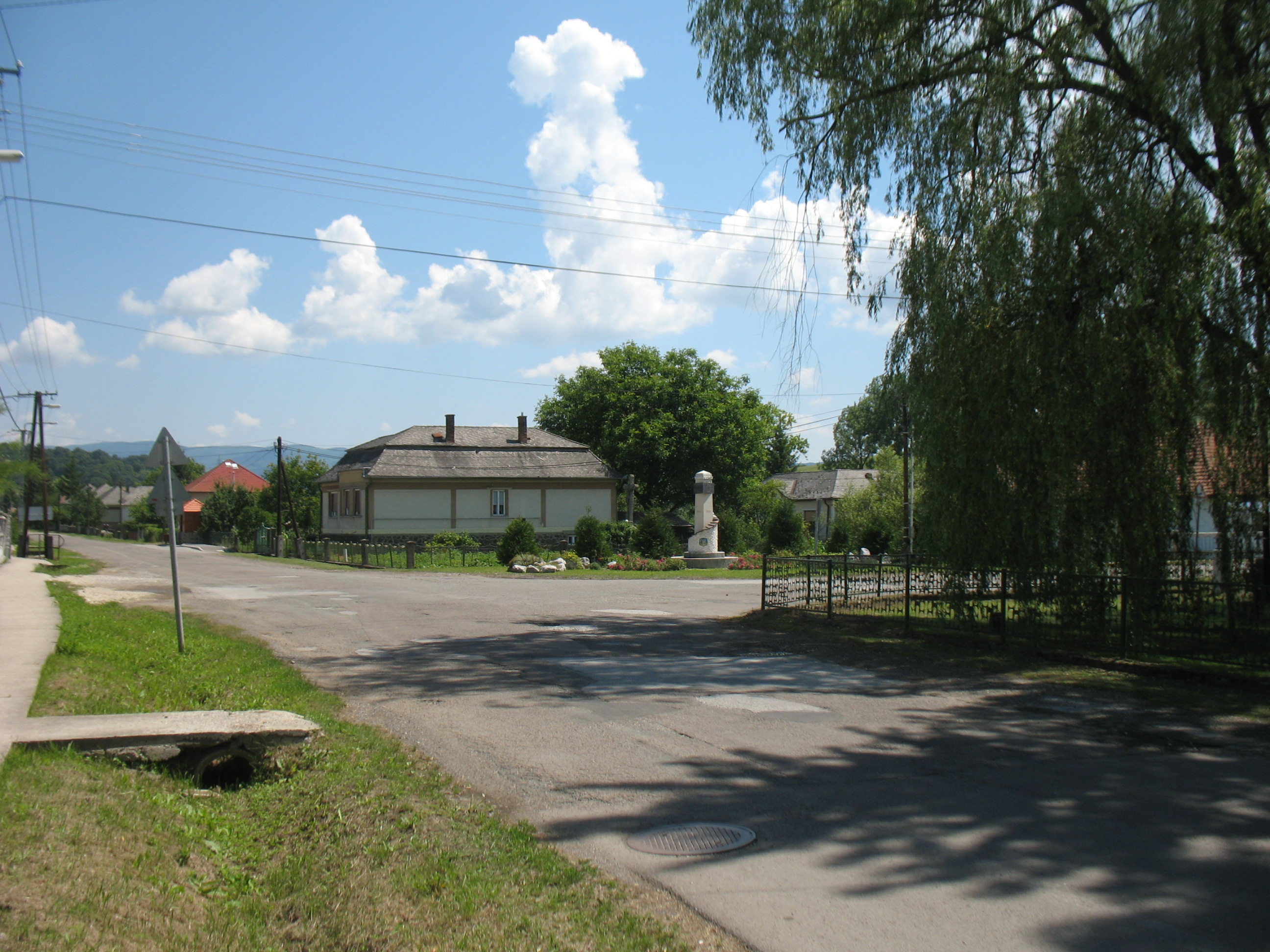 Bekölce